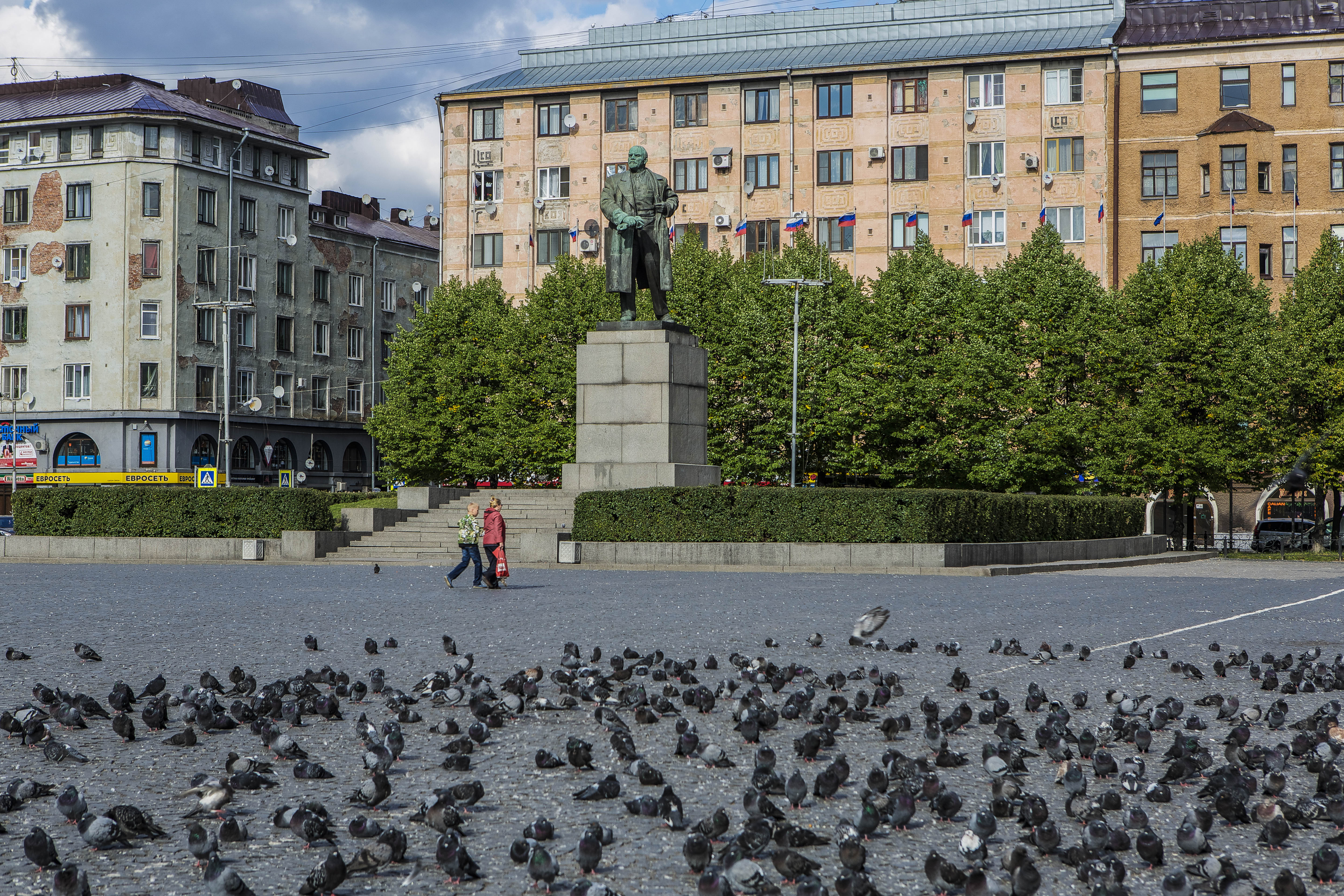 Leninin patsas Viipuri